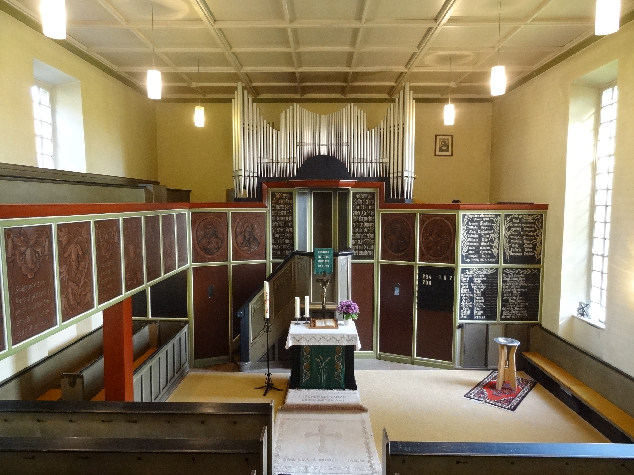 Evangelische Kirche Weickartshain